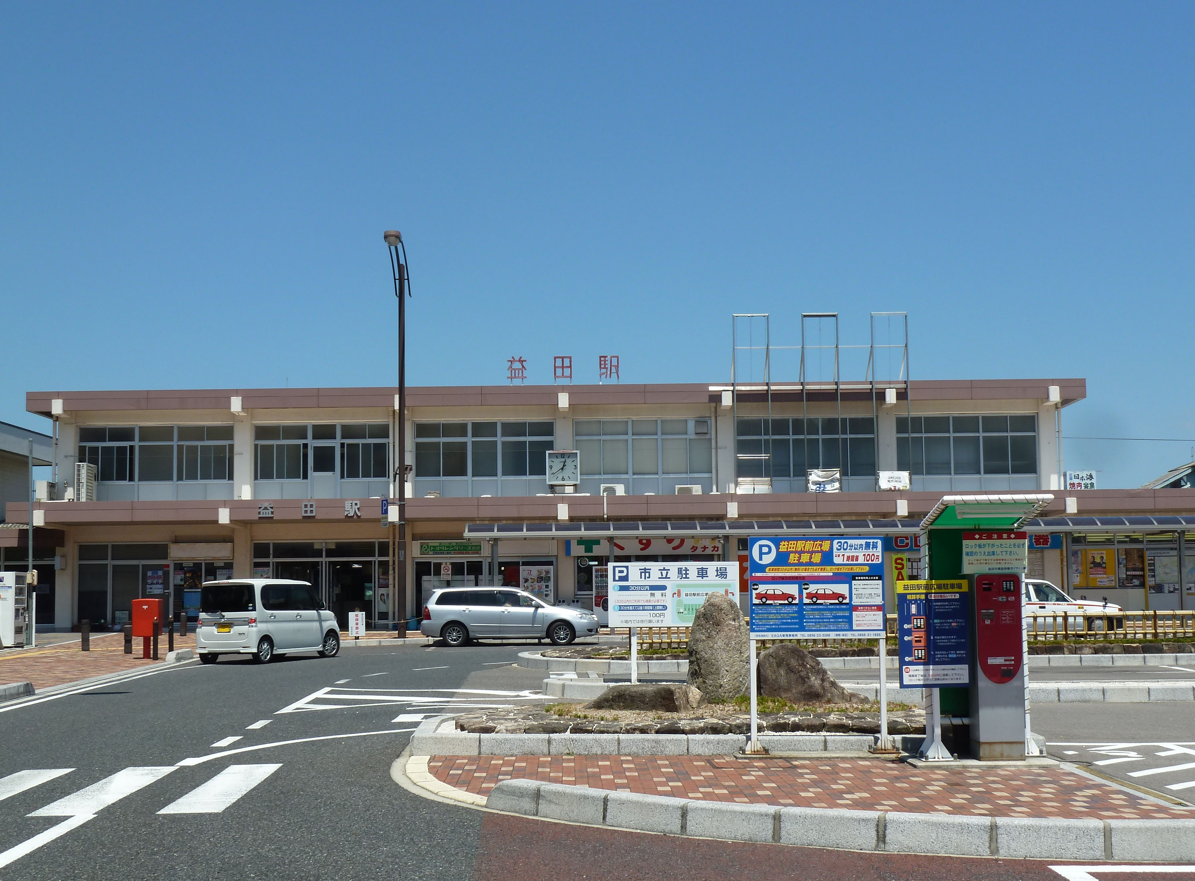 益田駅の駅舎